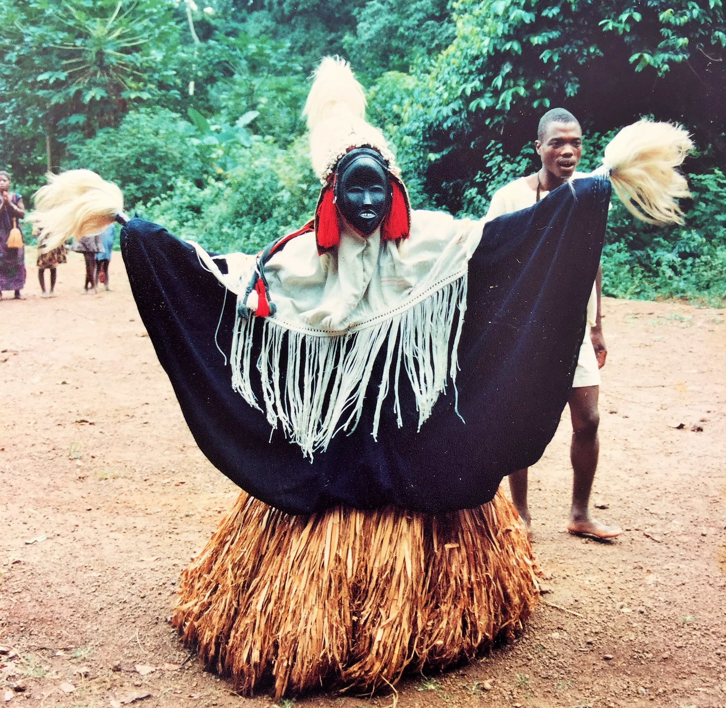 Masque traditionnel de cérémonie des Boonis